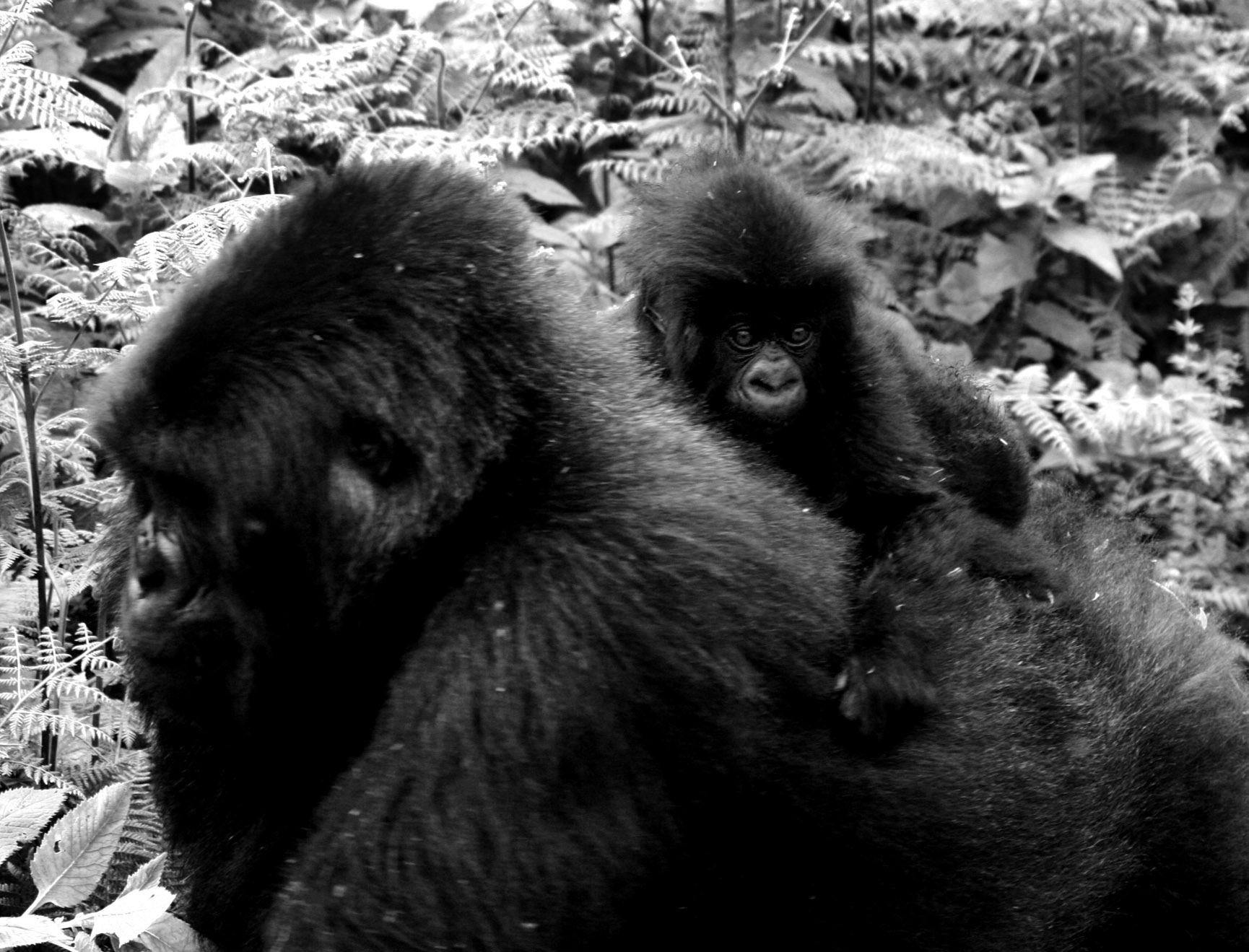 Mountain gorilla, Rwandapiggyback